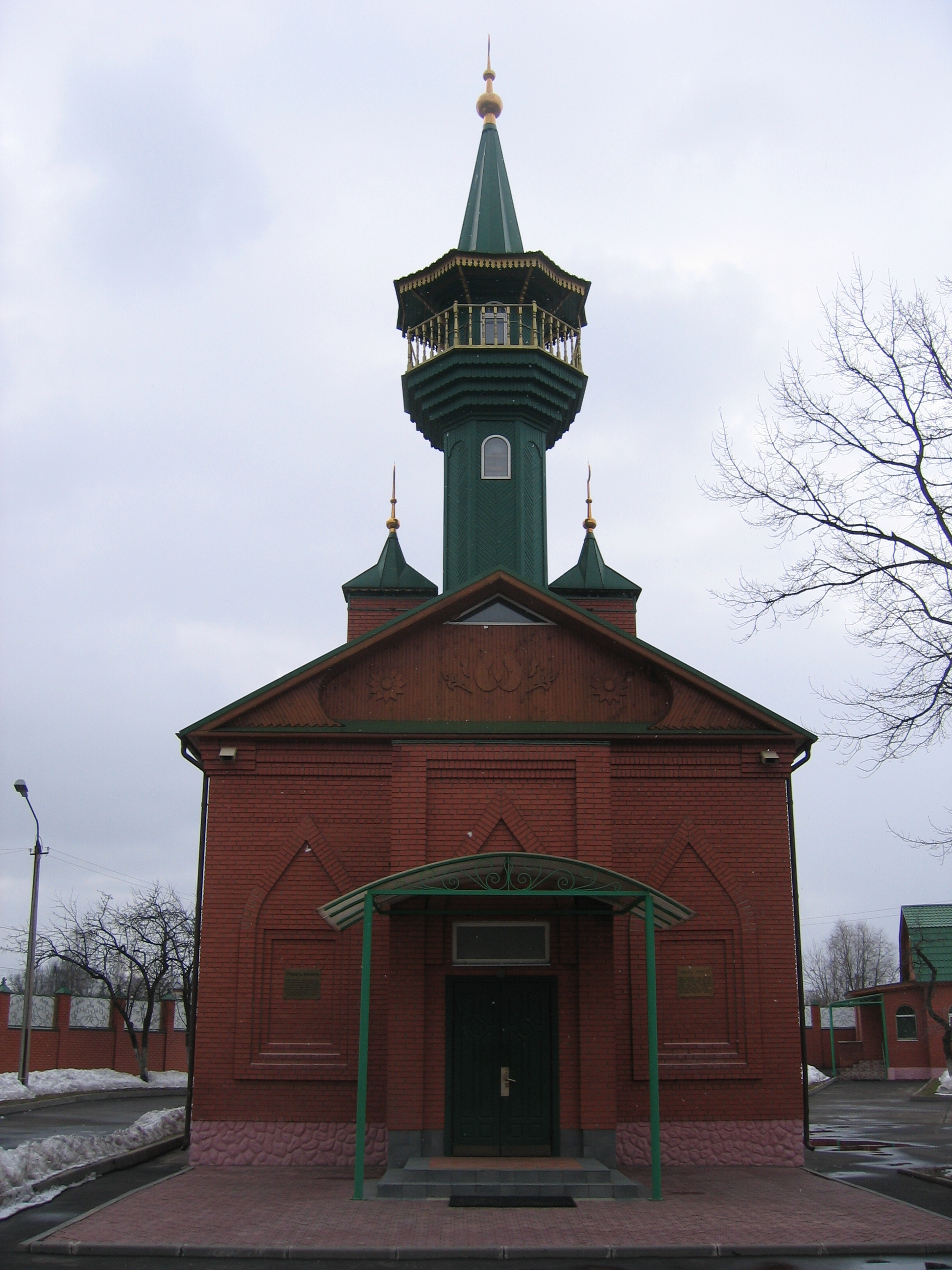 Мечеть в Щёлково